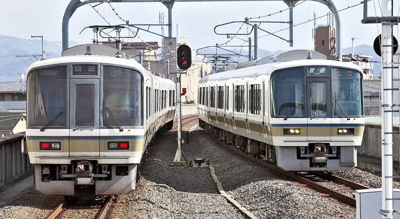 京都行回送列車（左）とリニューアル車による豊岡行1233M普通列車（嵯峨野線 花園駅）